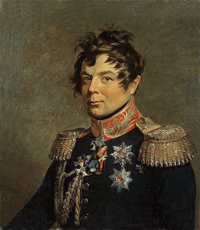 Hans Karl von Diebitsch (Ivan Dibich)